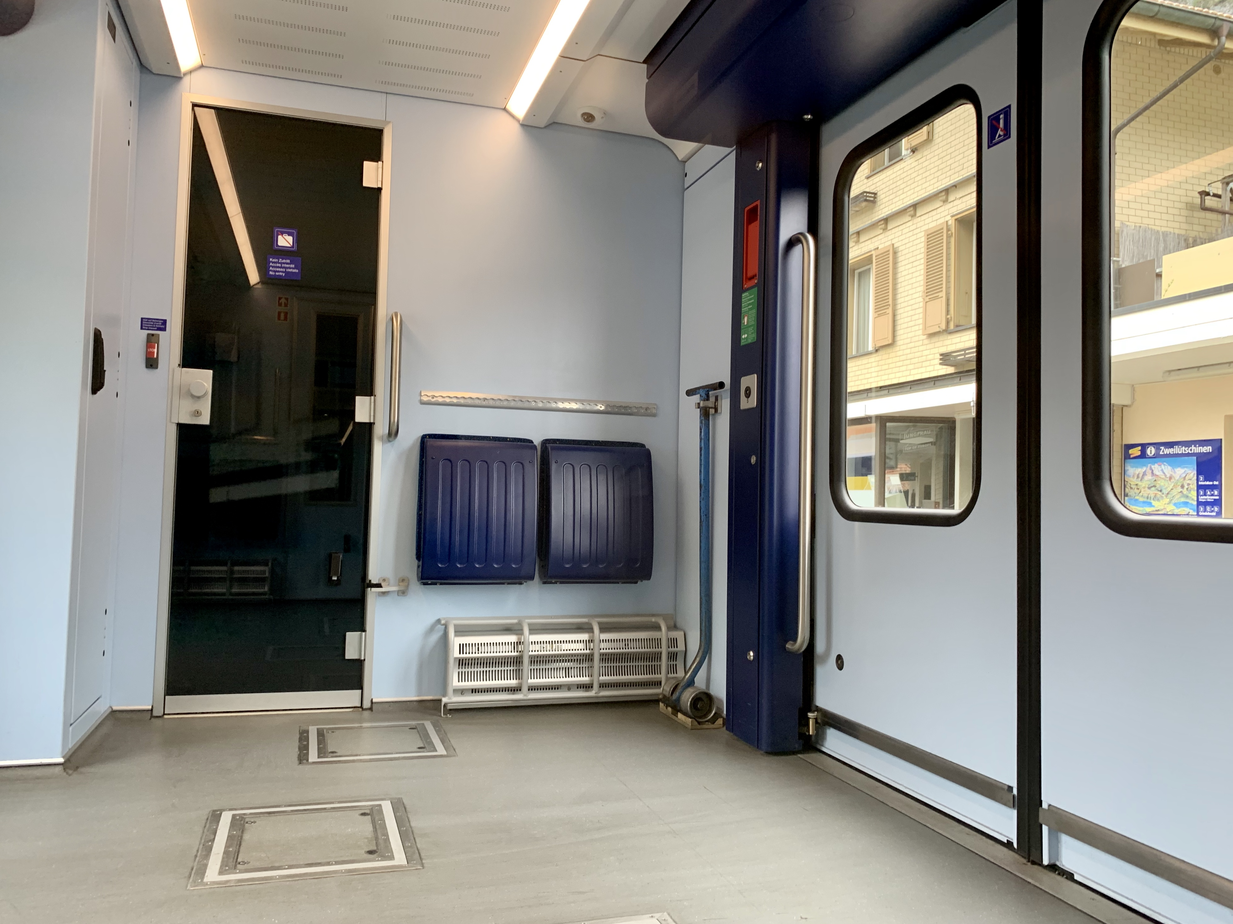 Ein Blick ins Gepäckabteil im ABDeh 8/8